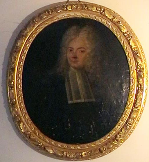 Jacques Raudot (1638 - 1728), intendant de la Nouvelle-France de 1705 à 1711